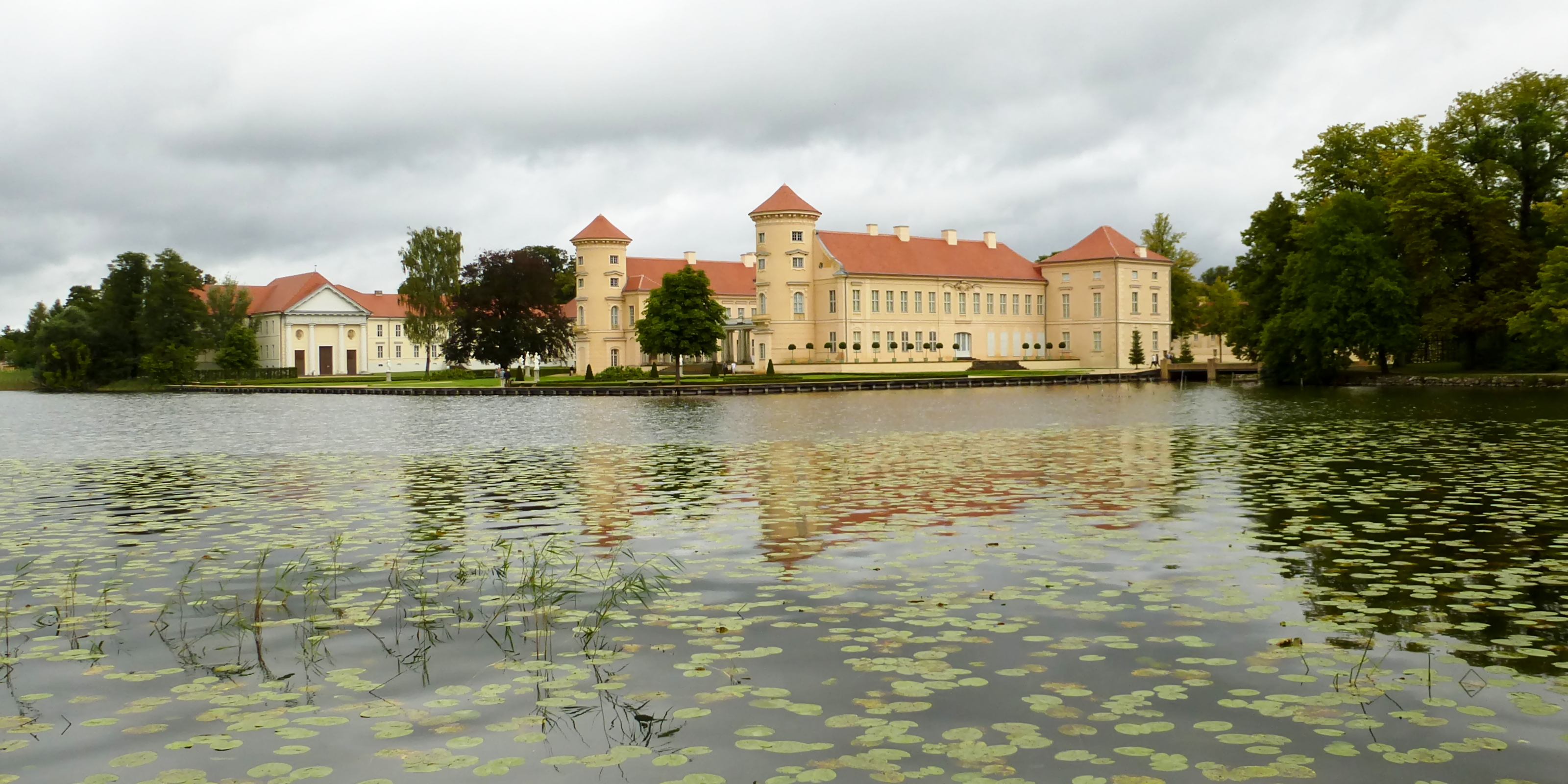 Schloss Rheinsberg (Gemeinde Rheinsberg, Landkreis Ostprignitz-Ruppin).